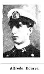 Teniente de Fragata Alfredo Bourré Allende.